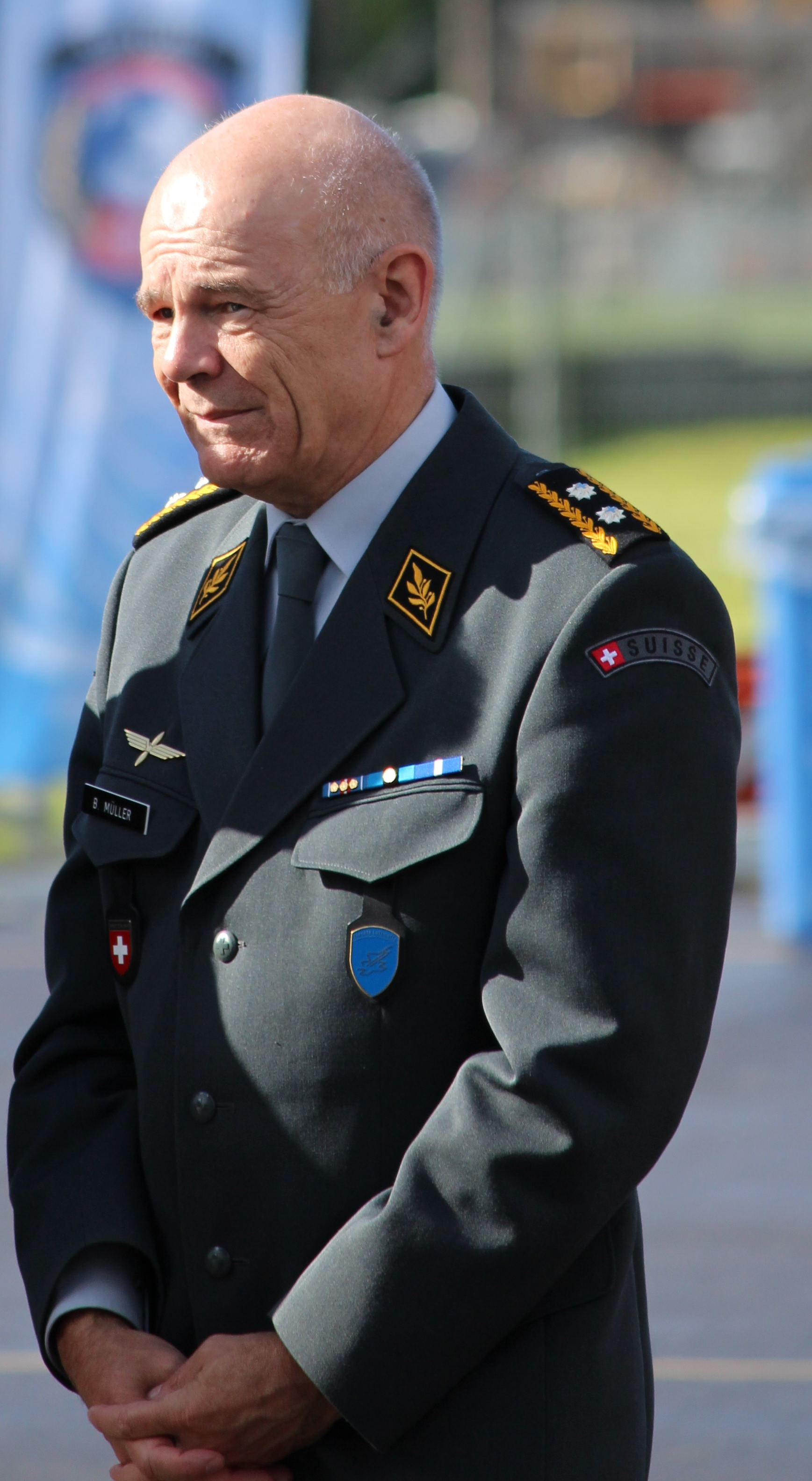 Bernhard Müller anlässlich des Jubiläums 75 Jahre Militärflugplatz Alpnach